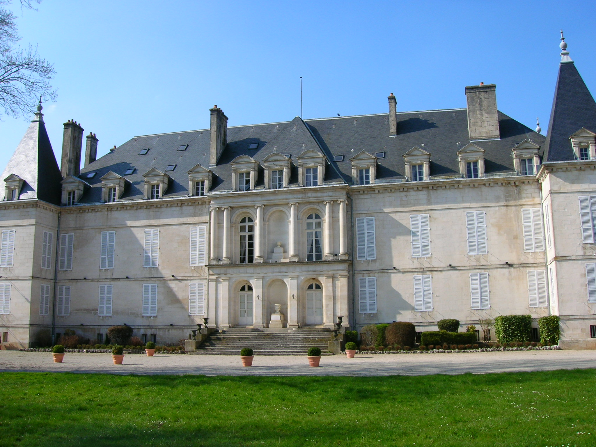 Château d'Arc-en-Barrois